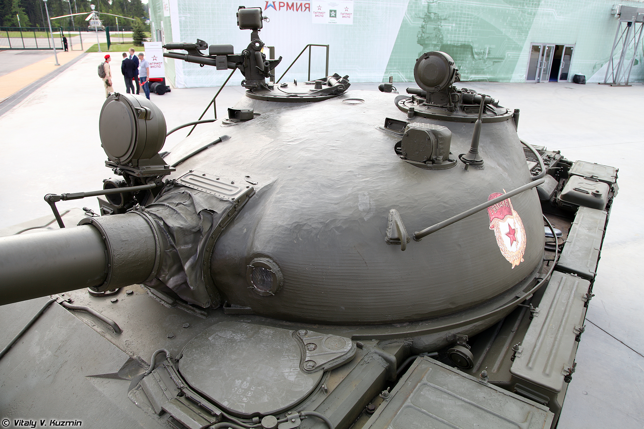 Т-62 обр. 1972г. (T-62 mod. 1972)